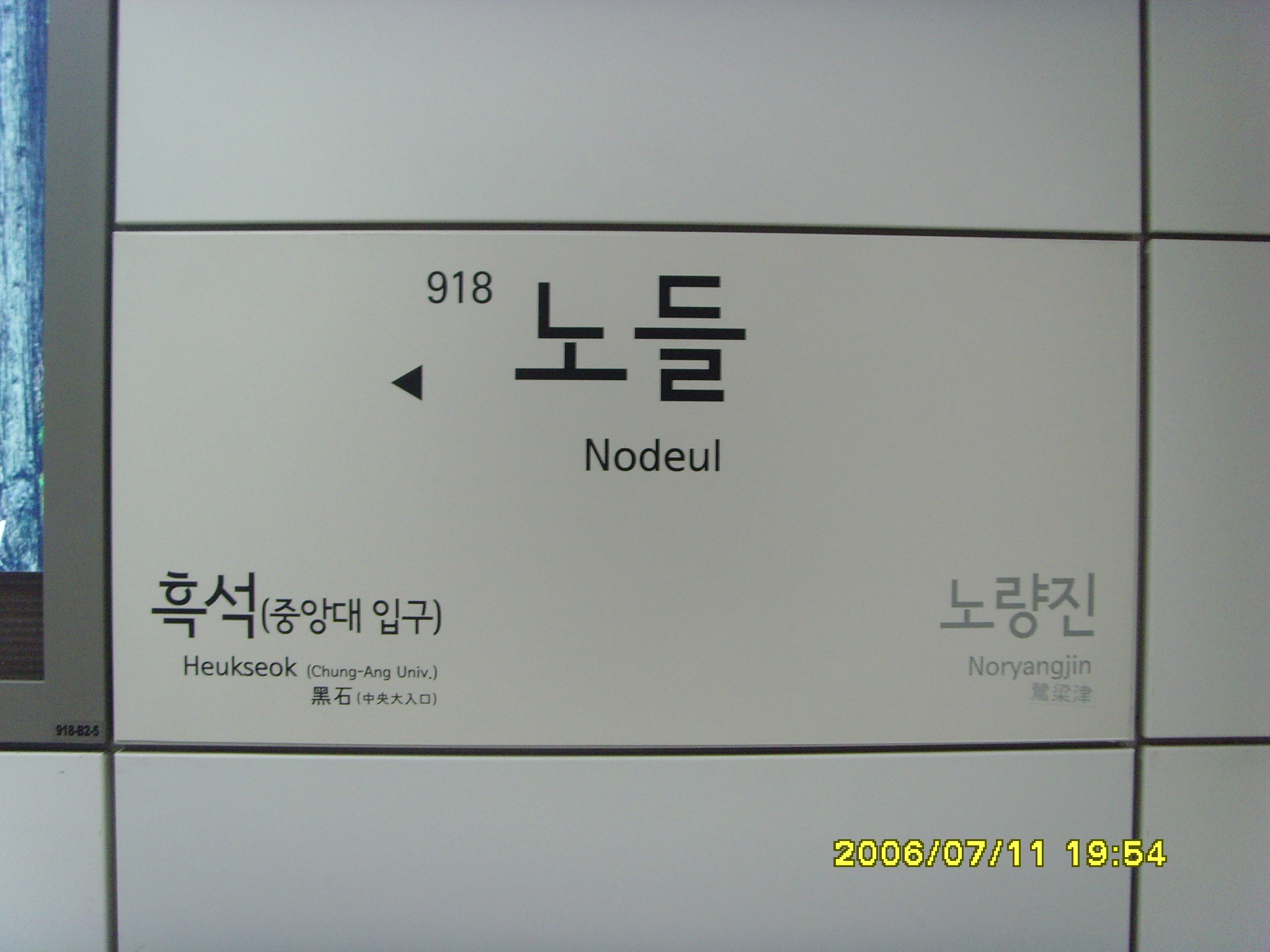 ソウル地下鉄9号線ノドゥル駅 駅名標